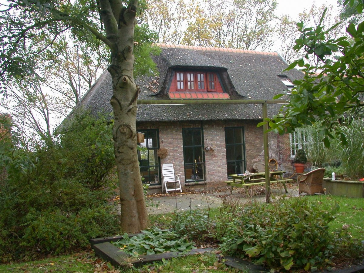 De Phenix/ Ten-Bruggencatenummer: 03042: Woonhuis bij achtkante grondzeiler (opmerking: Foto gemaakt in het kader van het project Actualisering Monumentenregister (AMR).)